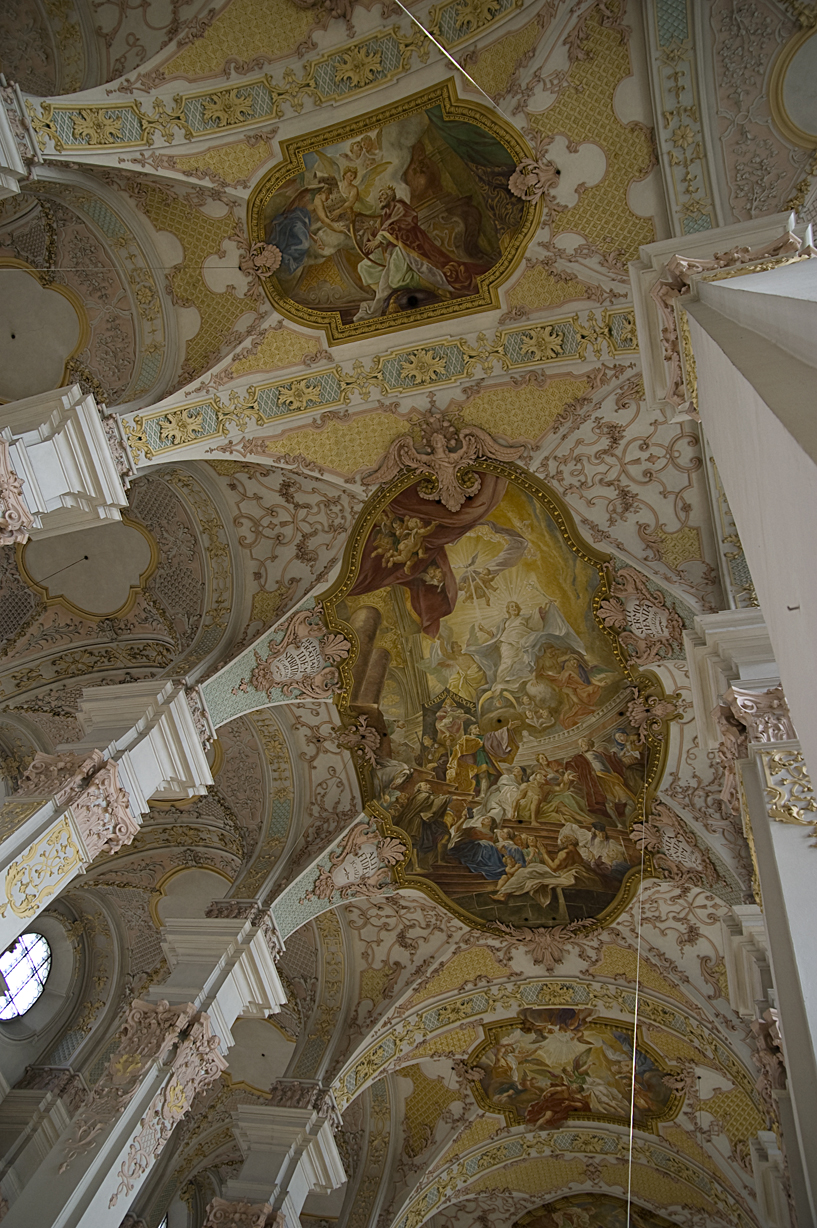 Heilig-Geist-Kirche in München